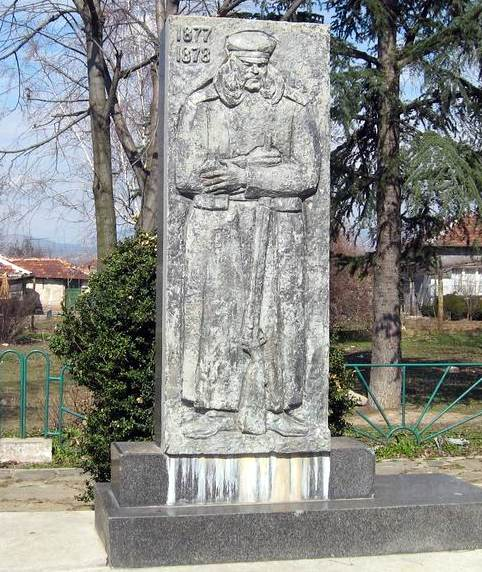 Братска могила на 4 нисши чина и старши вахтмистър от 4-ти ескадрон на 9-ти хусарски Киевски полк и 1 нисш чин от 16-та конна батарея, убити на 19 юли 1877 г. под Джуранли (Калитиново).